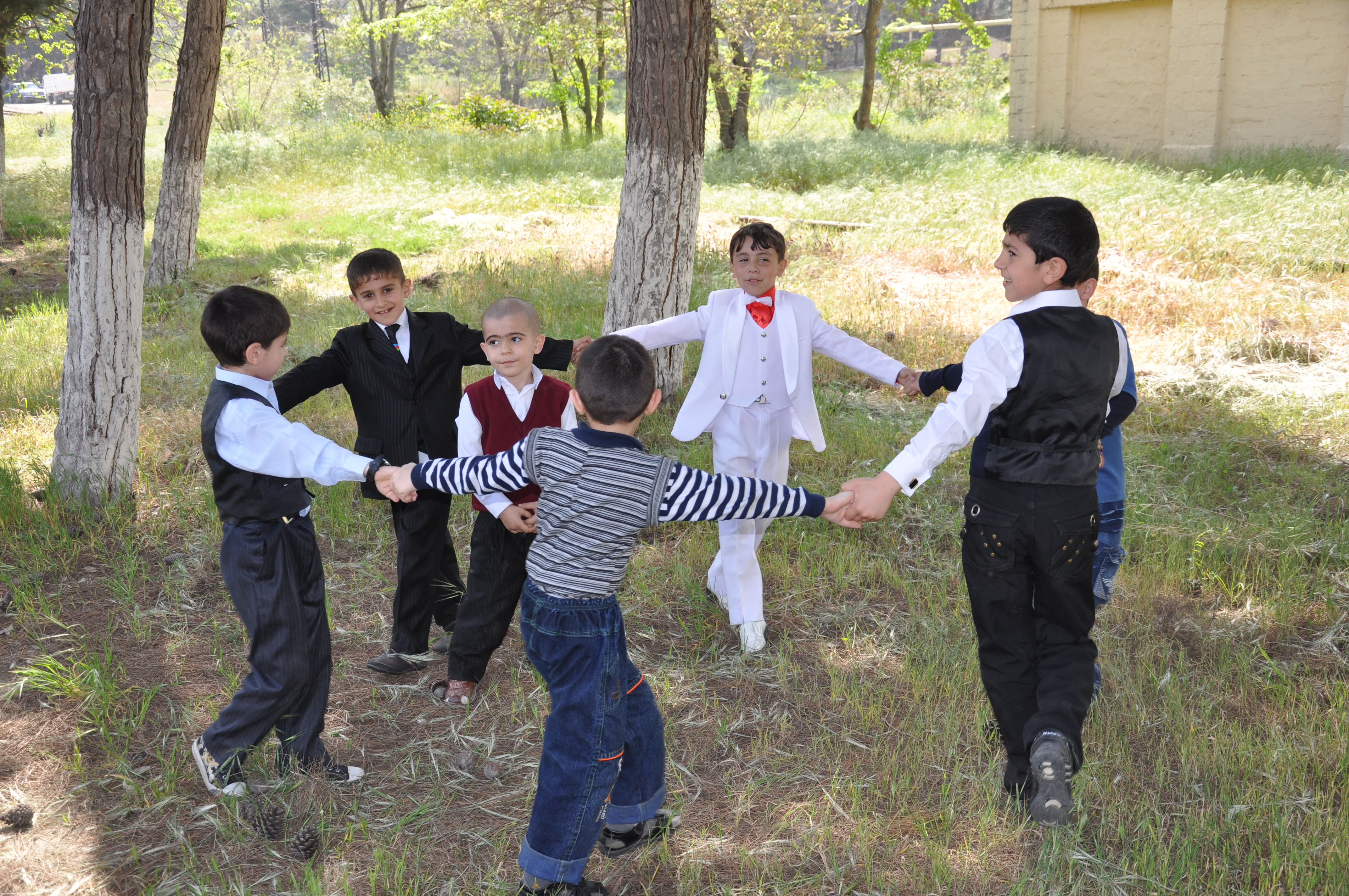 Keçəl — Azərbaycanda əsasən yazqabağı (bayramqabağı) günlərdə, əsasəndə Novruz bayramı ərəfəsində uşaq və gənclər arasında geniş şəkildə oynanılan qədim oyunlarından biridir.